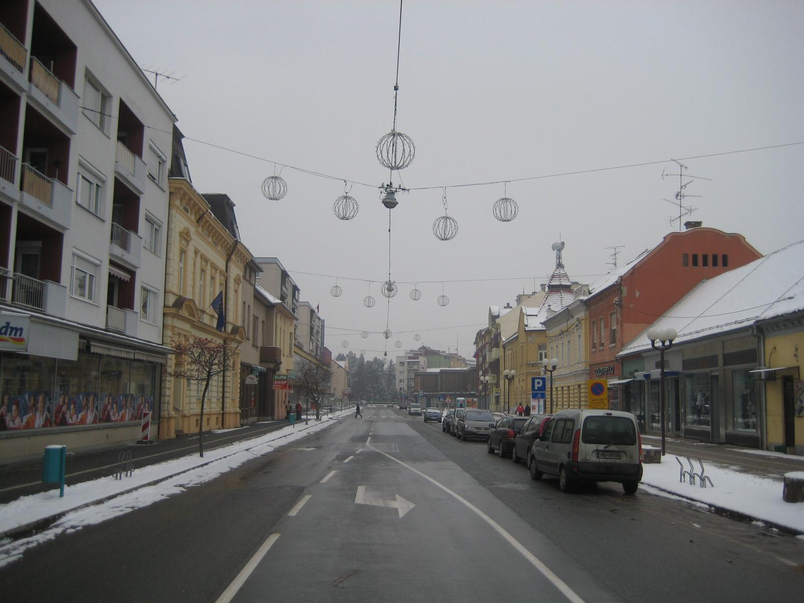 Murska Sobota, city in Slovenia